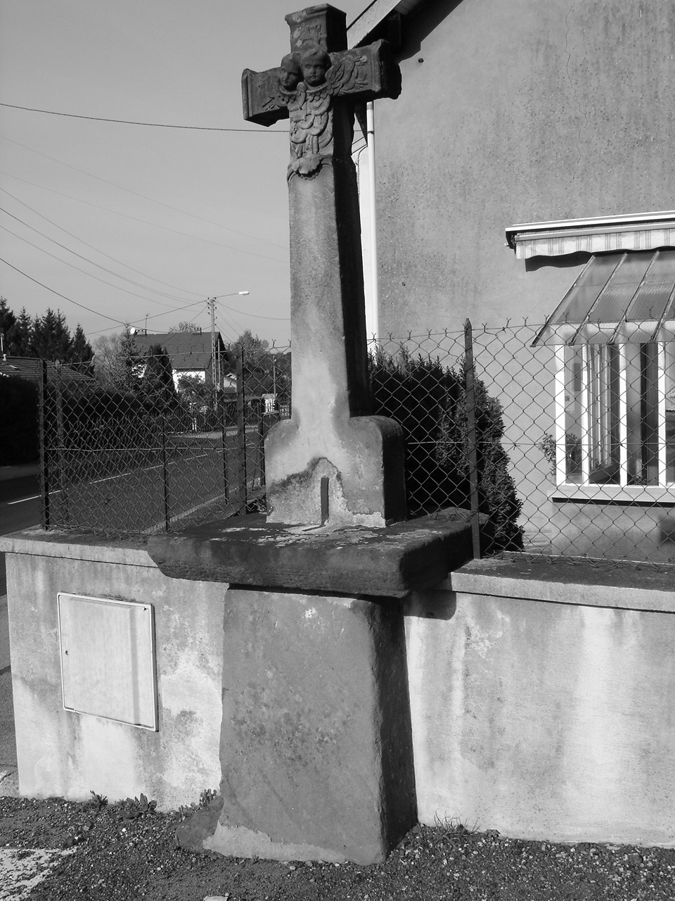 croix de carrefour en grès - restaurée